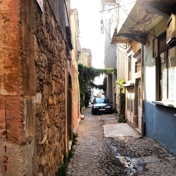 Ayvalık'ta bir sokak.